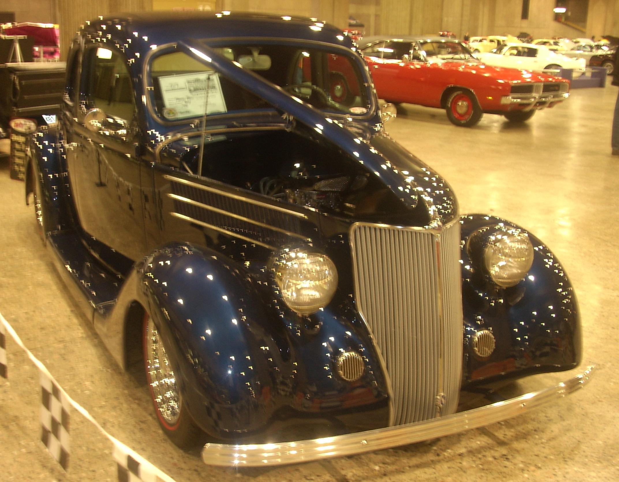 1936 Ford Model 48 photographed at Auto classique Montréal 2008.